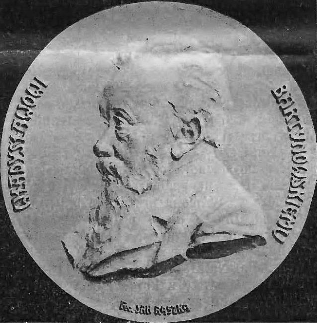 Medal upamiętniający Władysława Martynowskiego wykonany przez Jana Raszkę (1906)